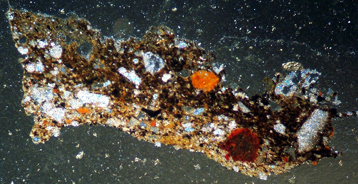 FR:Description Agrégat de sol archéologique observé en lame-mince micromorphologique, vue au microscope polarisant en lumière polarisée, analysée et réléchie (LPR) Photographe: Henri-Georges NATON Source: importé par le photographe Licence: GFDL-self